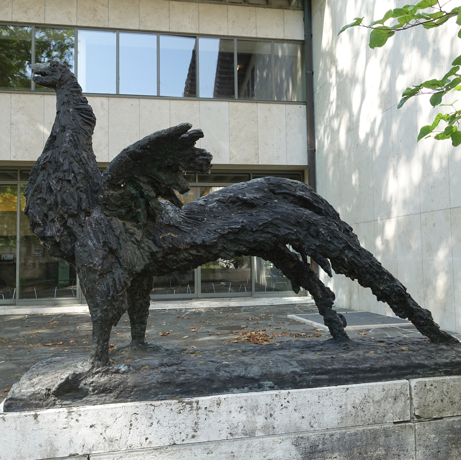 Skulptur, Coq, 1959. Innenhof Kollegiengebäude der Universität Basel von Fritz Bürgin (1917–2003) Bildhauer, Zeichner